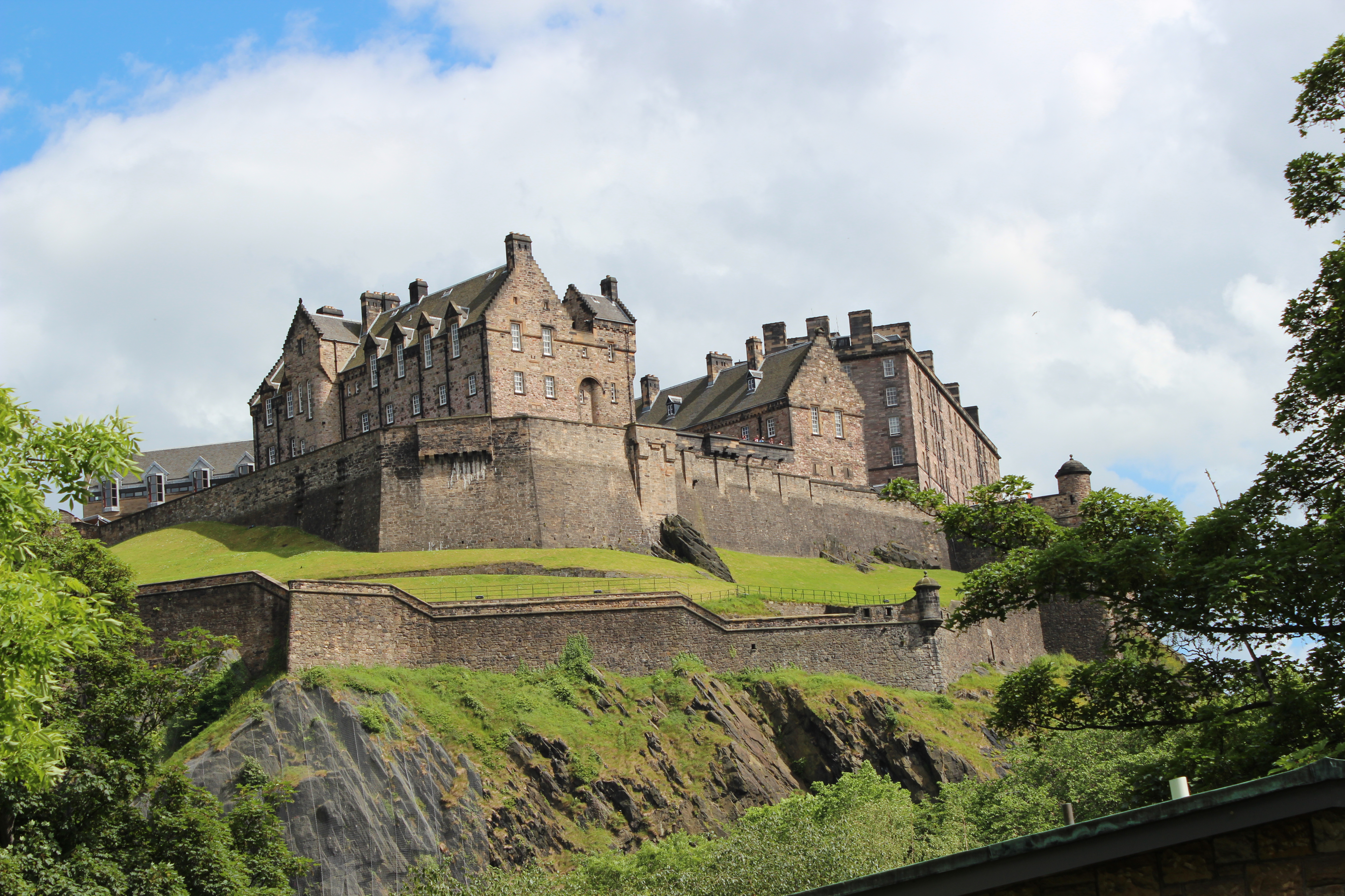 Edinburgh Castle in Schottland